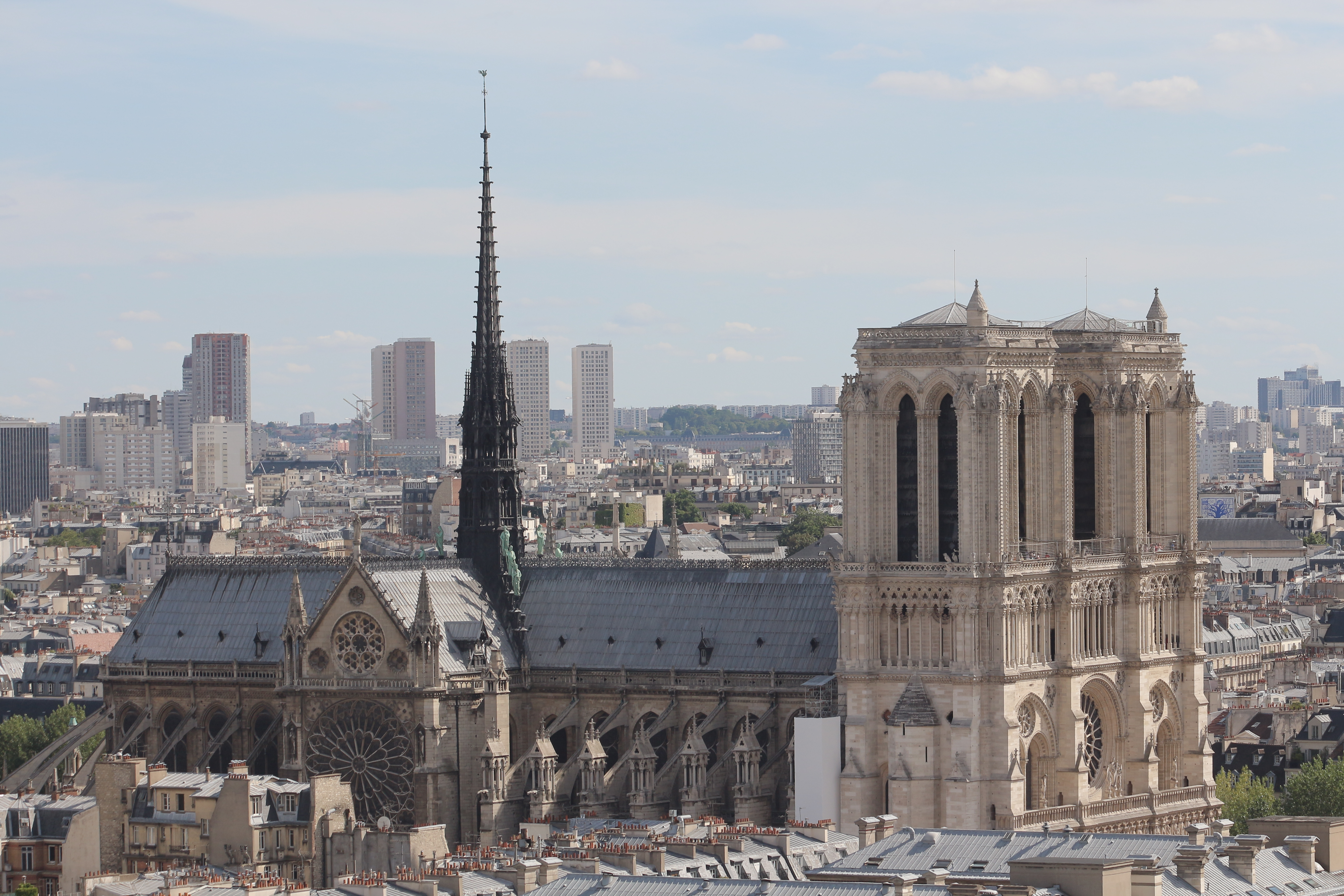 Notre-Dame de Paris vue depuis le sommet de la tour Saint-Jacques